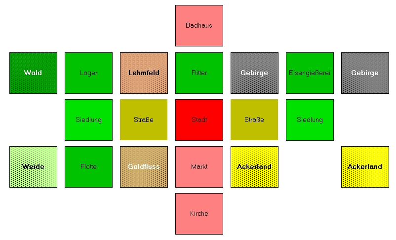 Schematischer Aufbau des „Siedler von Catan“-Kartenspiels